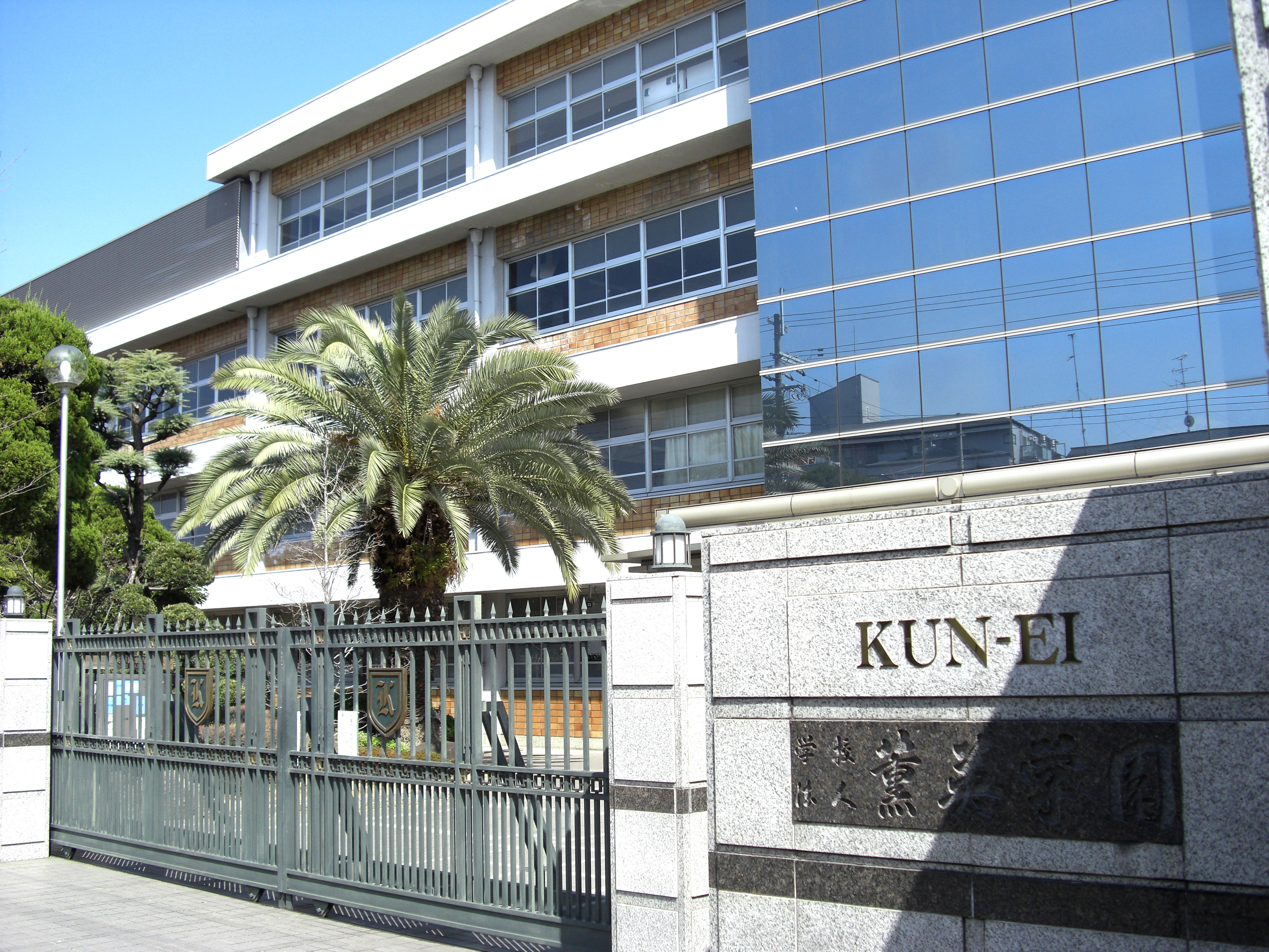 Osaka Kun-ei Senior High School,Shojaku Settsu-shi Osaka Japan.